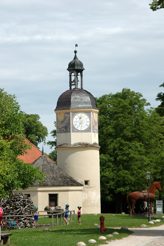 Burg zu Burghausen, Uhrturm im sechsten Burghof